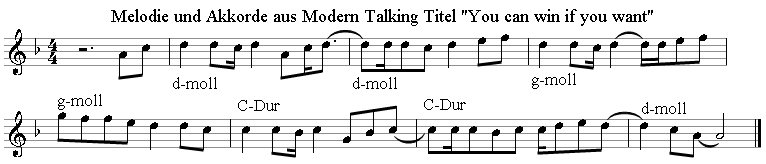 Melodie und Akkorde aus Modern Talking`s Titel "You can win if you want"